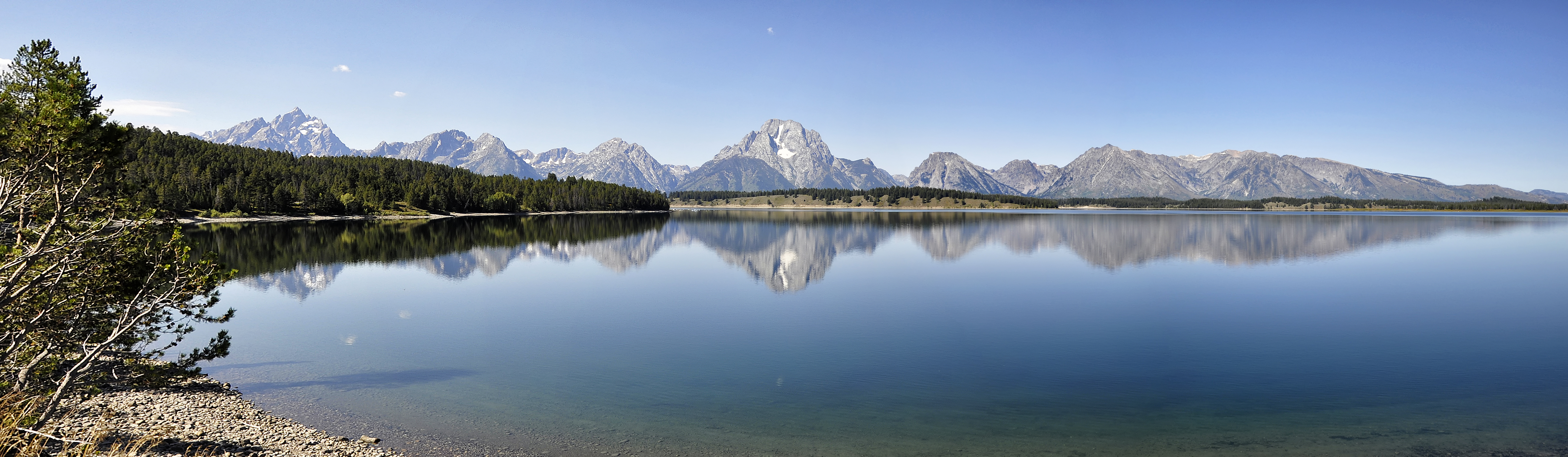 Jackson Lake, Grand Teton National Park - Wyoming USA